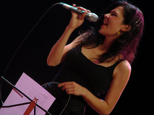 Show Conexão Latina - Marina de La Riva - São Paulo. Data: 26/10/2007. Foto por Débora Morbi.